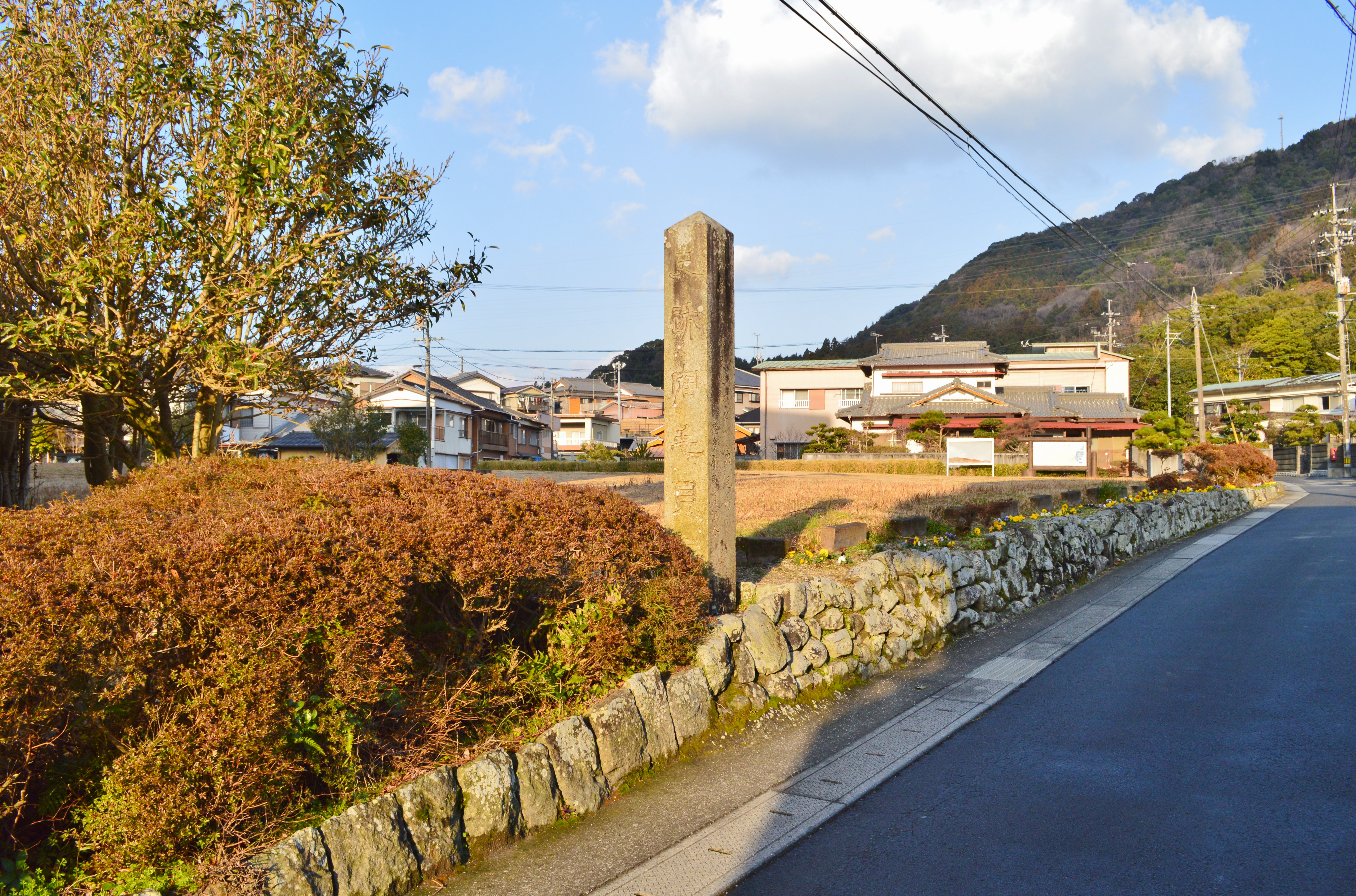 宿毛貝塚 石碑